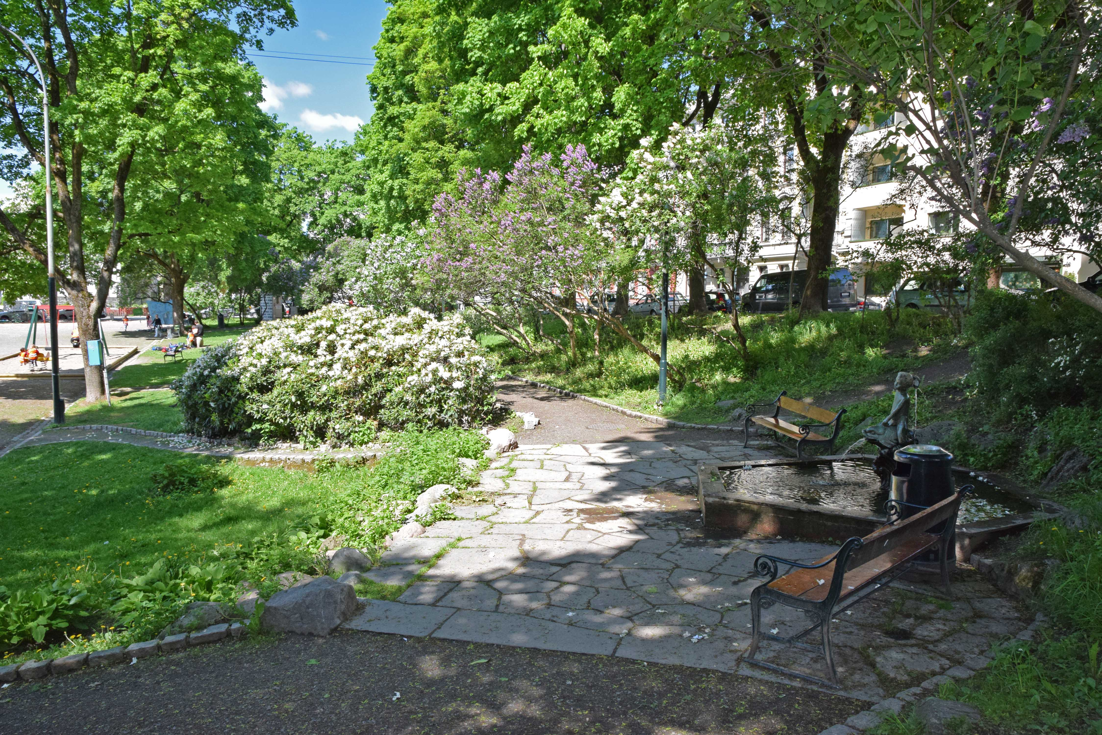 Vestkanttorvet med «Gutten på delfinen», fontenegruppe i bronse utført av Sigri Welhaven, avduket i 1929 og bekostet av Freia.